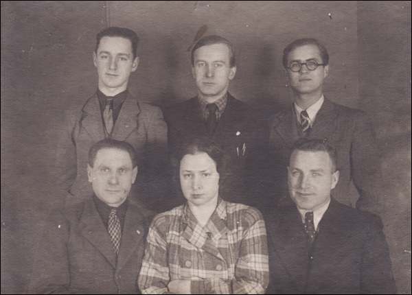 Рэдакцыя “Беларускай газеты” і “Голасу вёскі”. Сядзяць (злева направа): Уладзіслаў Казлоўскі, Наталля Арсеннева, Аляксей Сянкевіч. Стаяць (злева направа): Уладзімір Кушаль, Антон Адамовіч, Караленка. Мінск, снежань 1942 г.